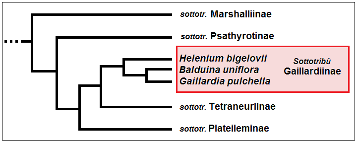 Gaillardiinae - Cladogramma della sottotribù